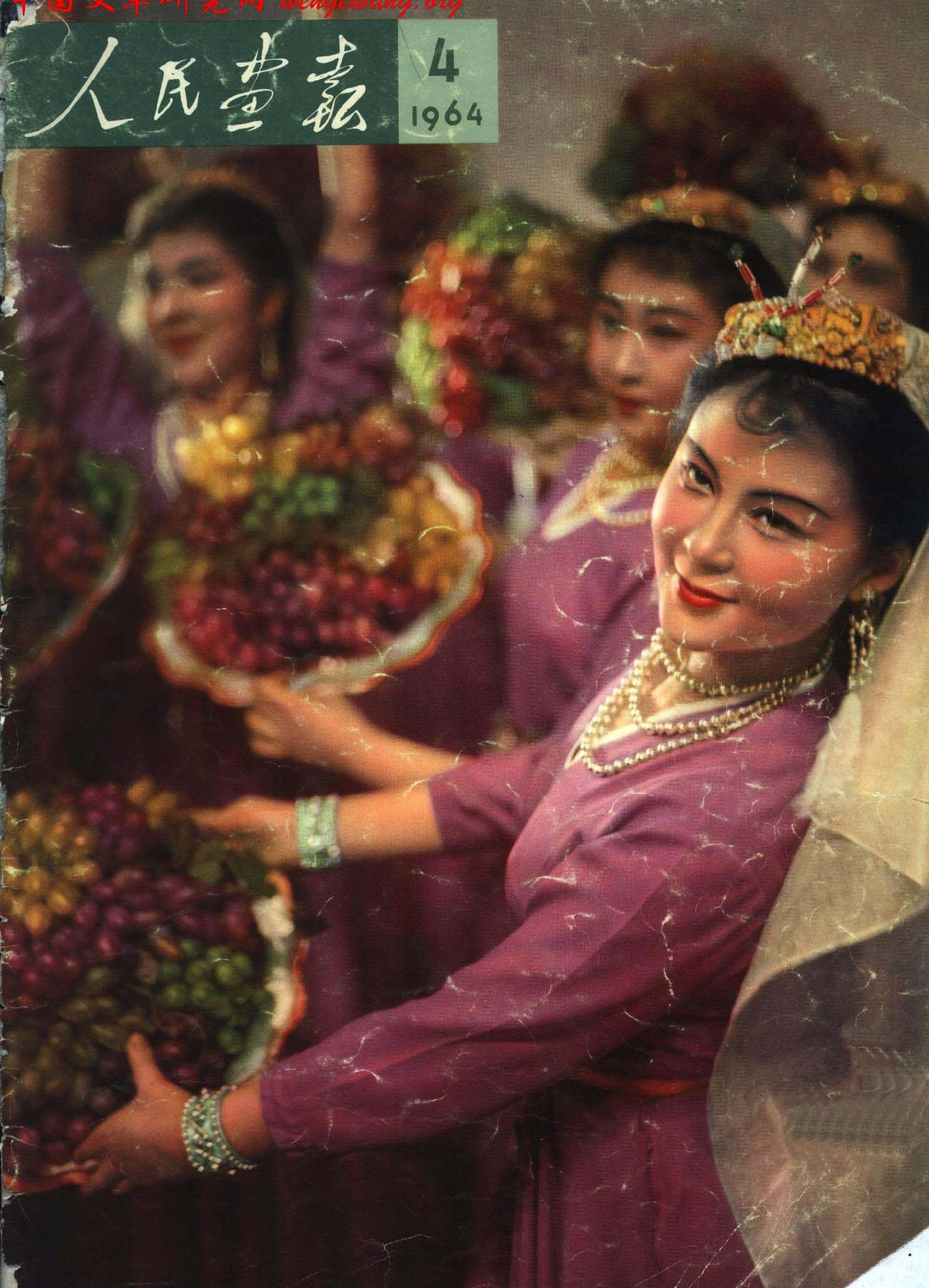 1964-04 1964年 新疆歌舞团 葡萄架下